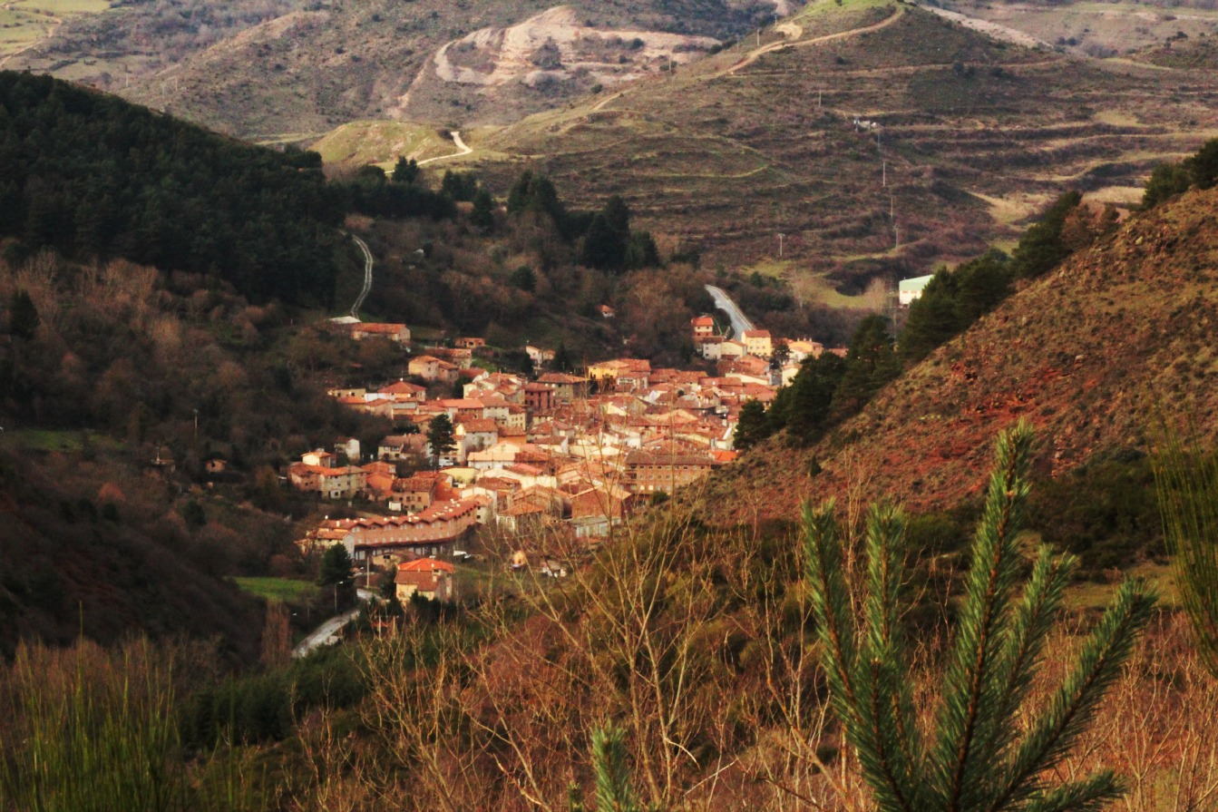 Pradoluengo, pueblo situado en la provincia de Burgos (España).